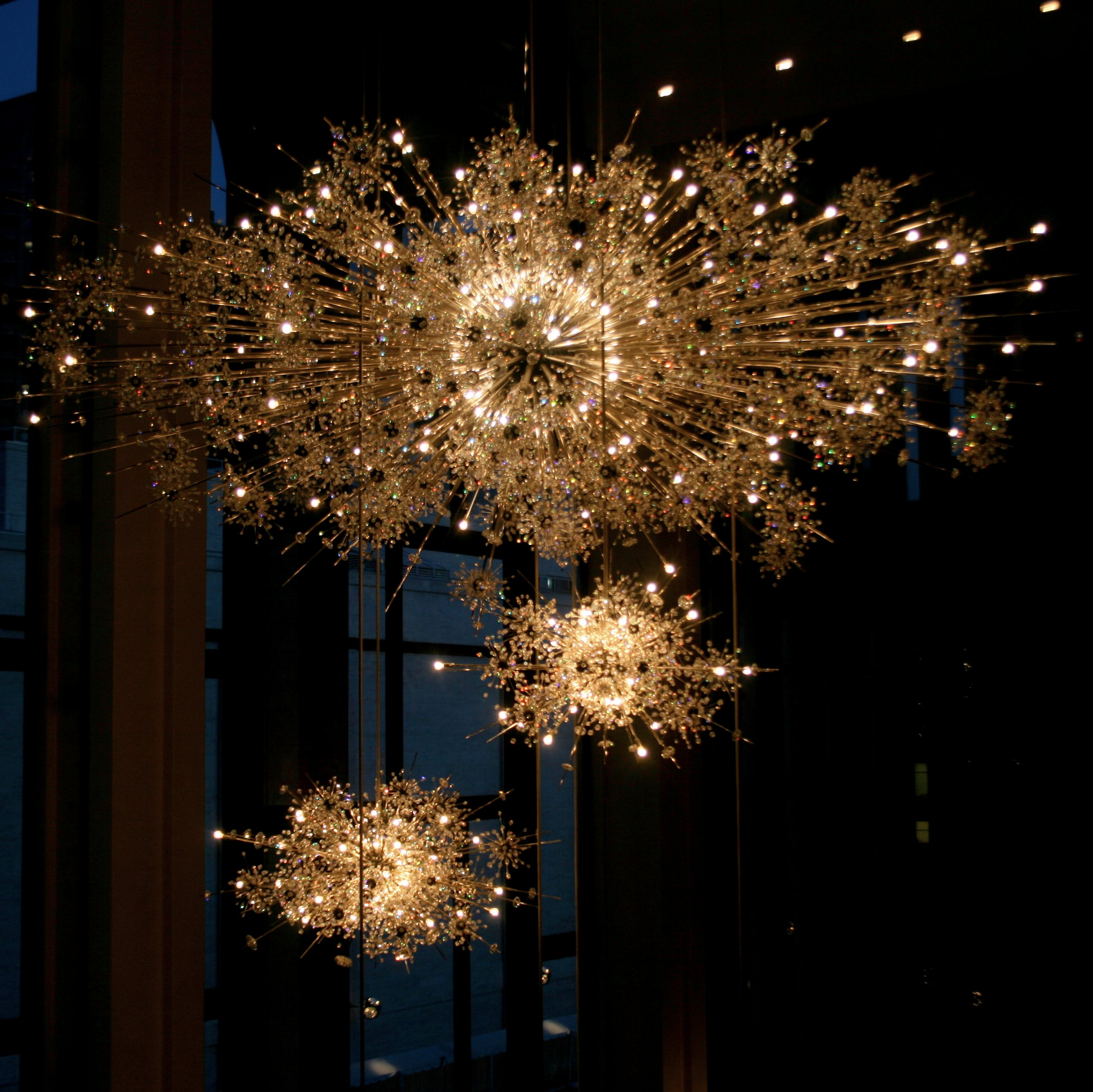 Metropolitan Opera